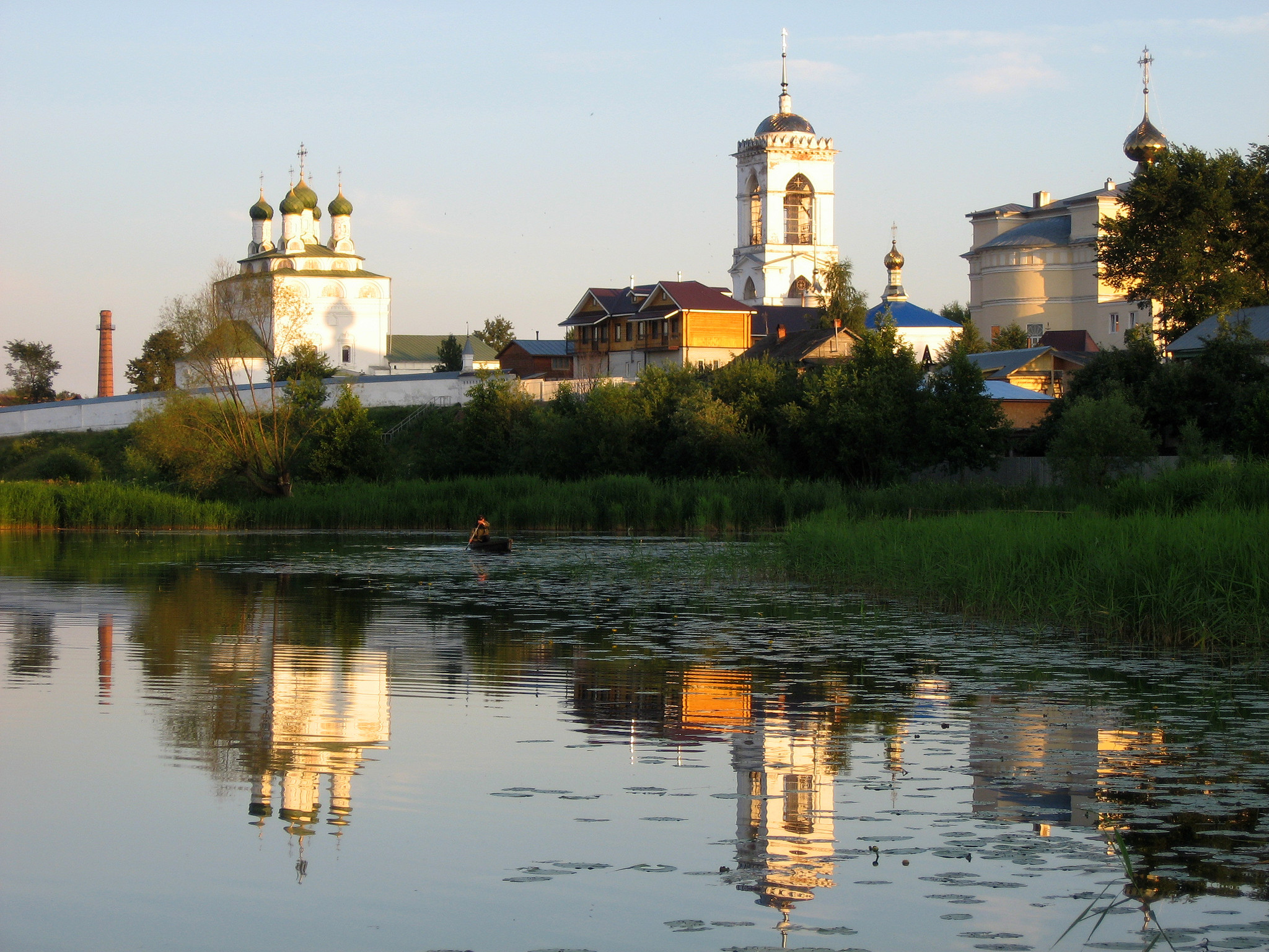 Монастырь Богоявленский: площадь Ленина 12, Мстёра, Вязниковский район, Владимирская область